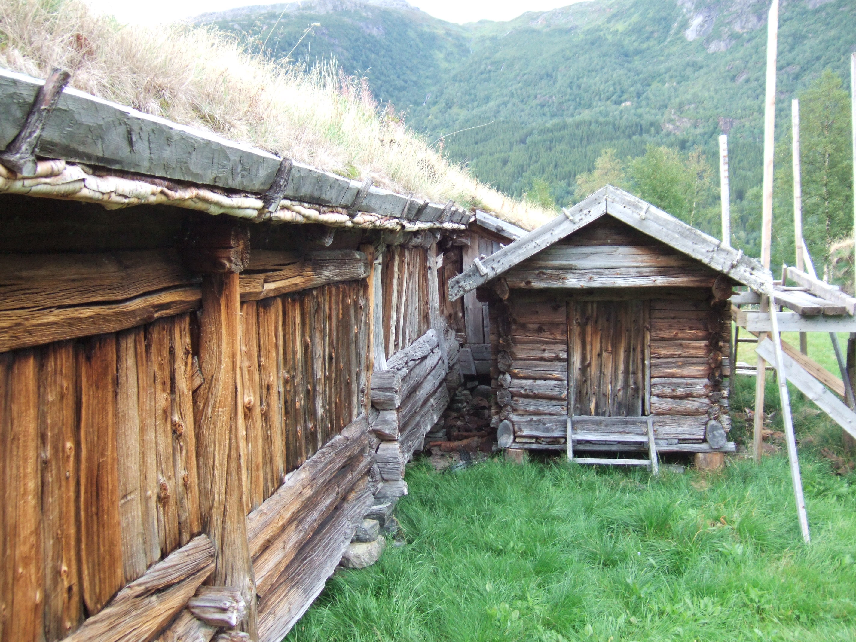 Stabur tilhørende Sjønstå gård i Fauske kommune i Nordland. Gården er nå fraflyttet.